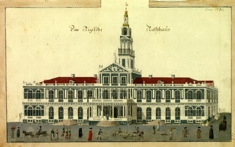 Das Rigische Rathhaus